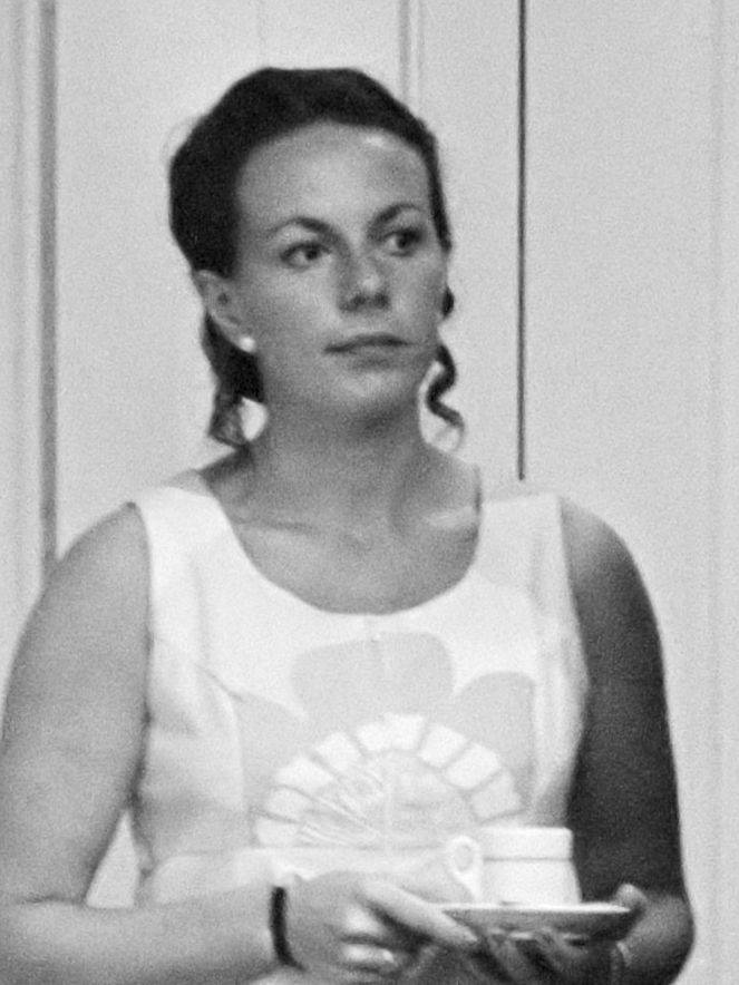 Tweede Kamer , premier Biesheuvel beantwoordt vragen fractievoorzitters, mevrouw drs. N. Smit-Kroes (VVD) in maxi-jurk 5 augustus 1971